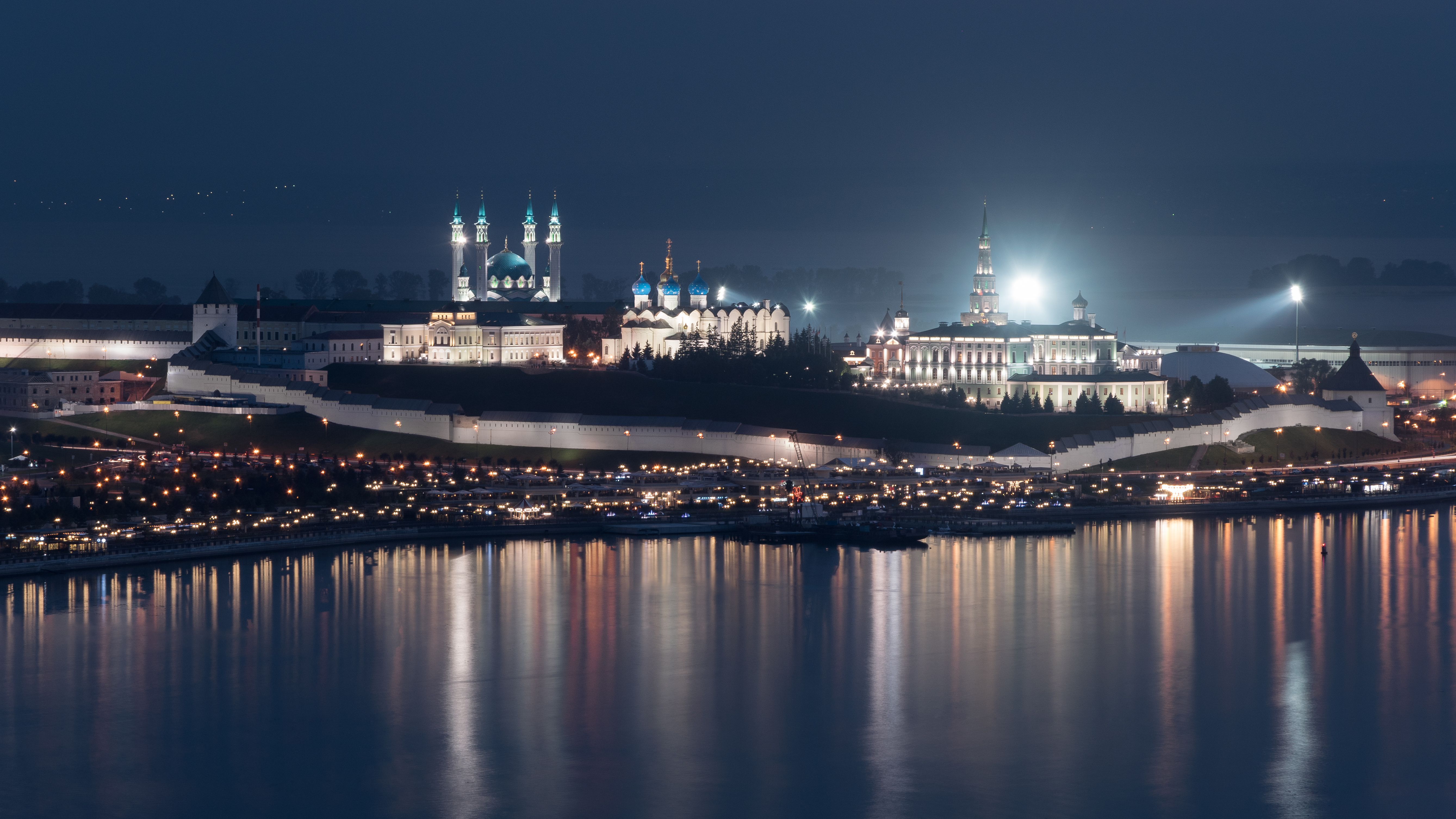 Ансамбль Казанского Кремля (Государственный историко-архитектурный и художественный музей-заповедник Казанский Кремль): Кремль, Казань, Татарстан